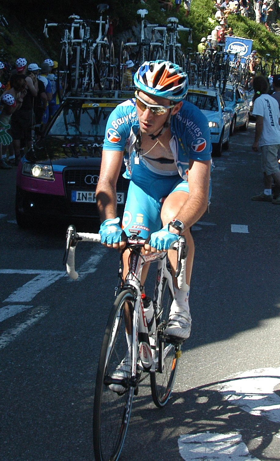 Jérôme Pineau at stage 7 of the Tour de France 2007 on the Col de la Colombière.